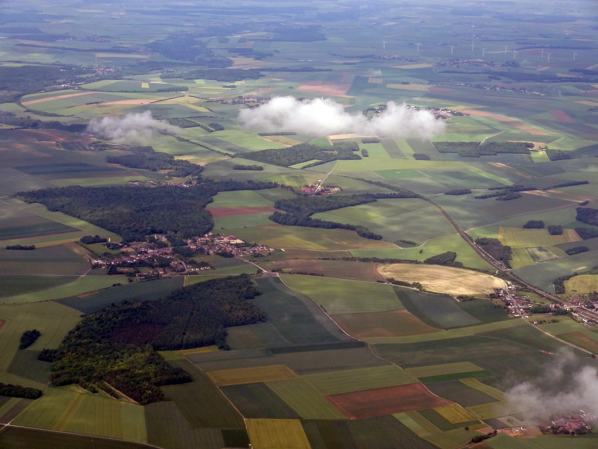 Vue aérienne de Tartigny et de Rouvroy-les-Merles (Oise), France.